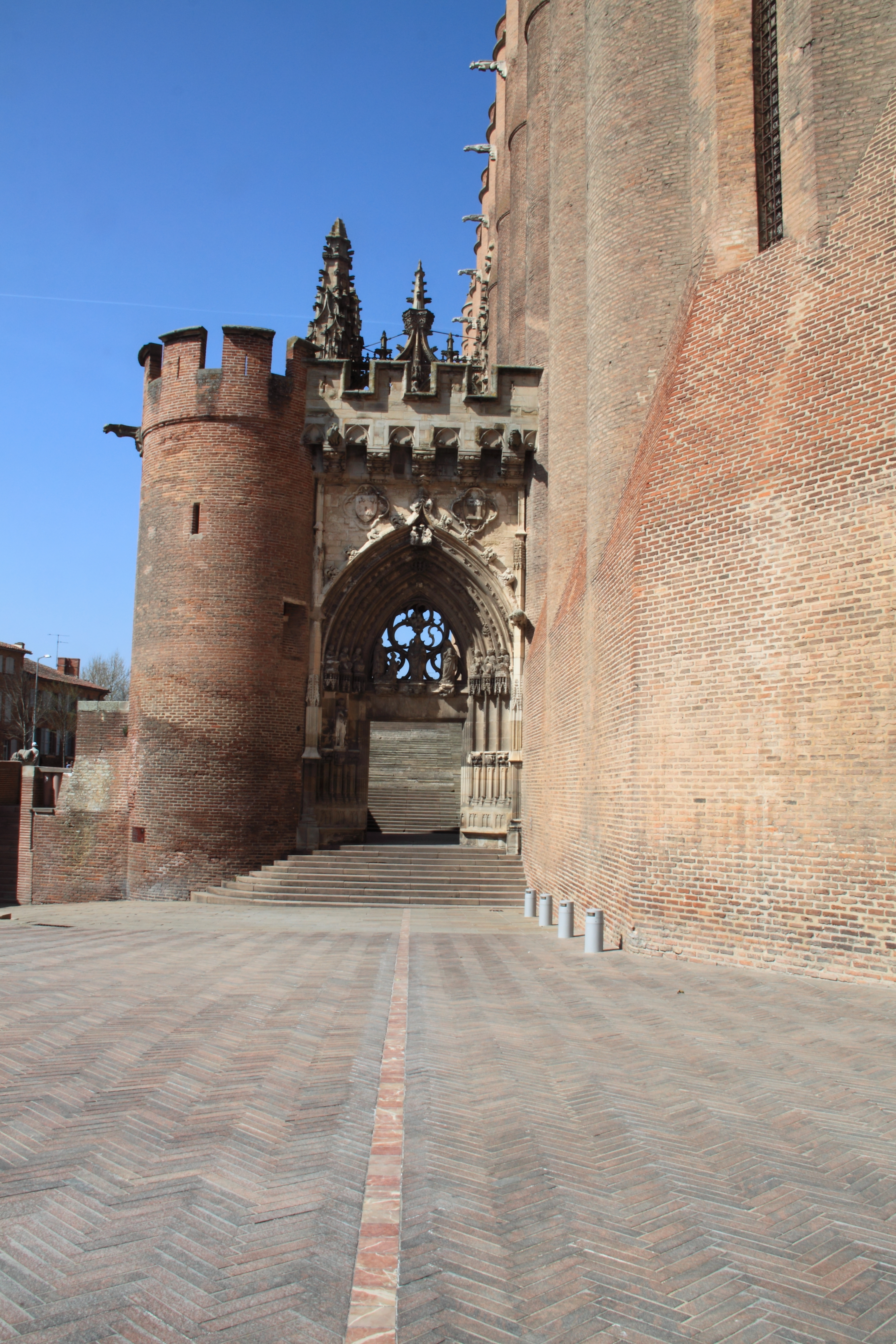 Cathédrale Sainte-Cécile d'Albi